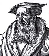 Heinrich Bullinger, Stich aus dem 16. Jhd